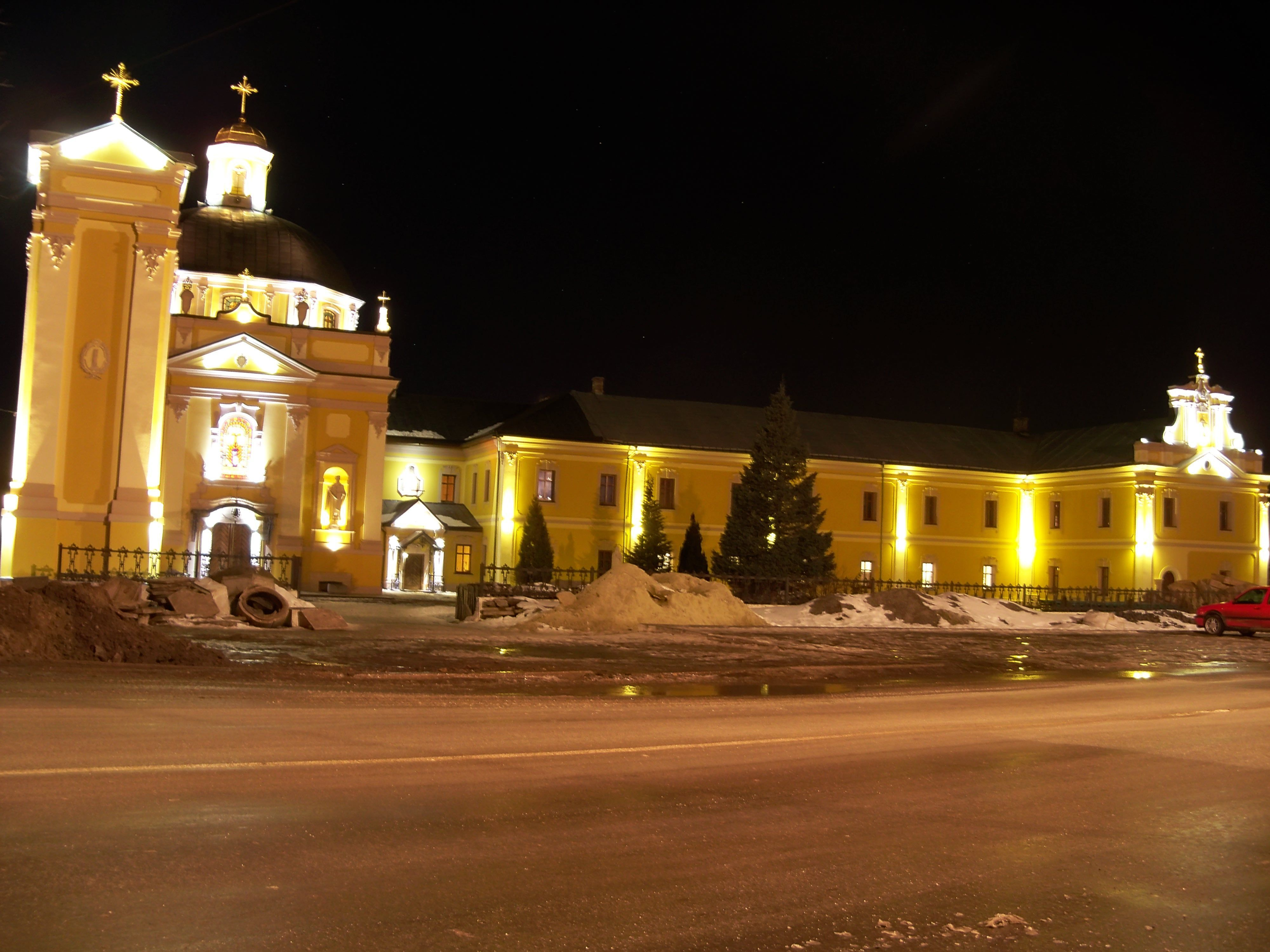 Василіянський монастир (мур.), Червоноград, вул.Б.Хмельницького, 21